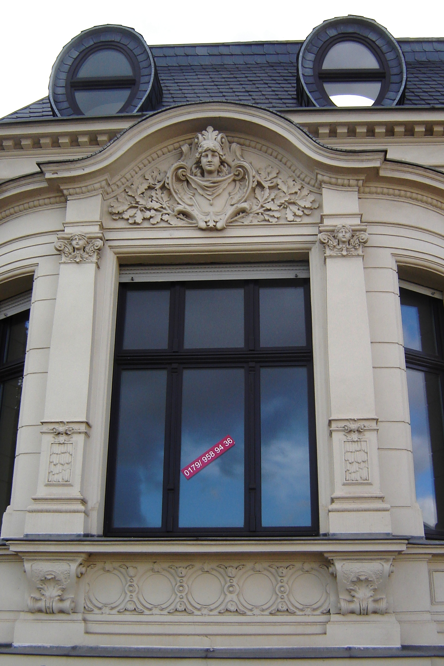 Magdeburg-Diesdorf, Lütge-Villa, Erker (Kulturdenkmal)